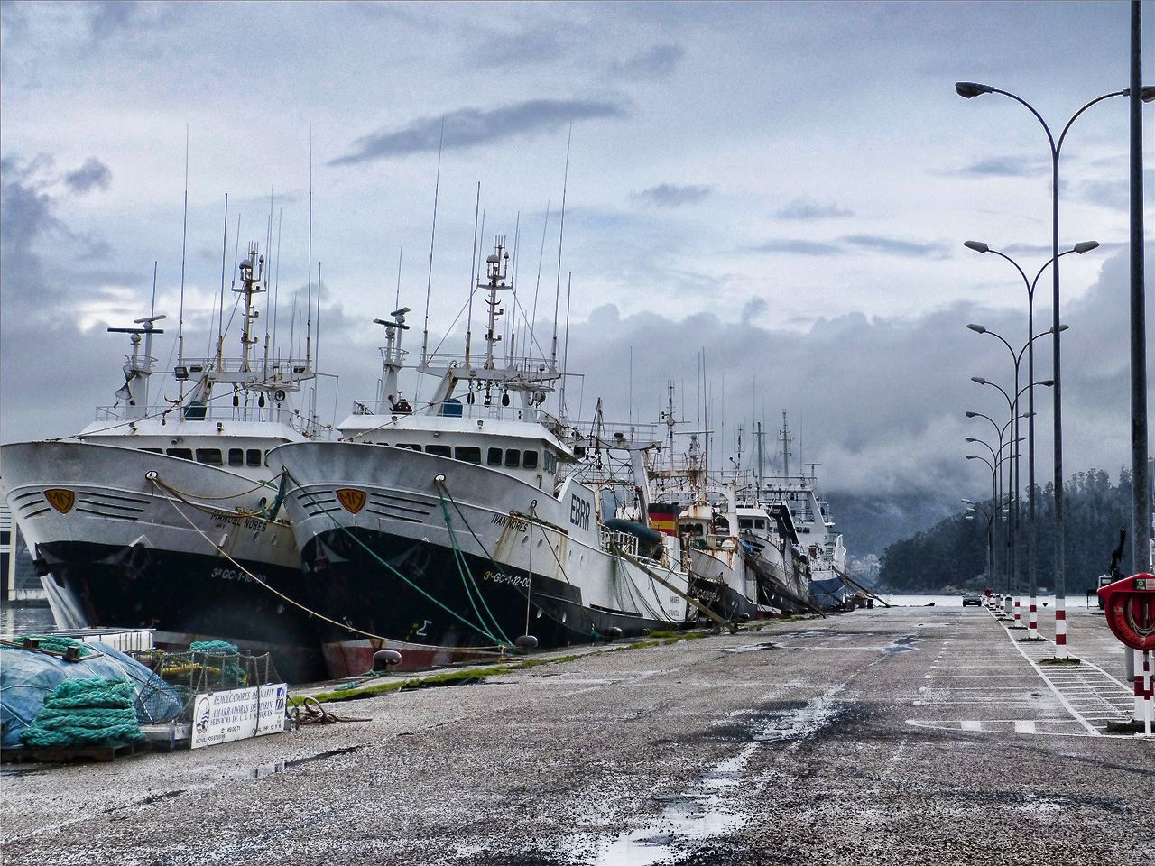 Puerto de Marín-Barcos atracados